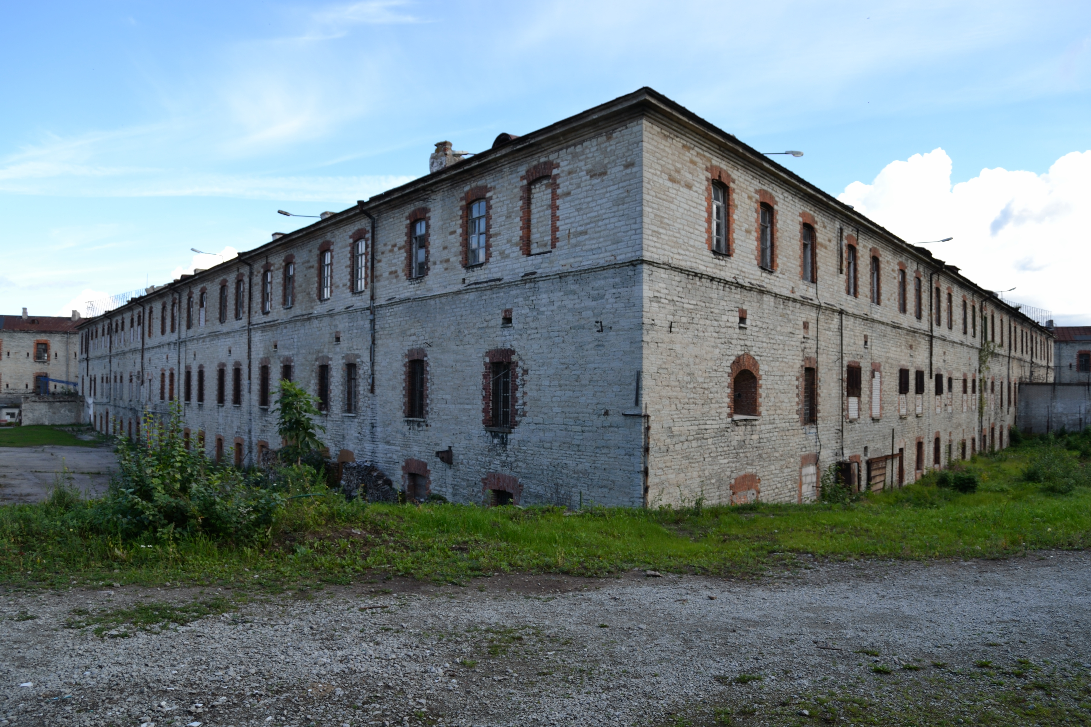 Tallinn, Kaitsekasarm, 1829-1840